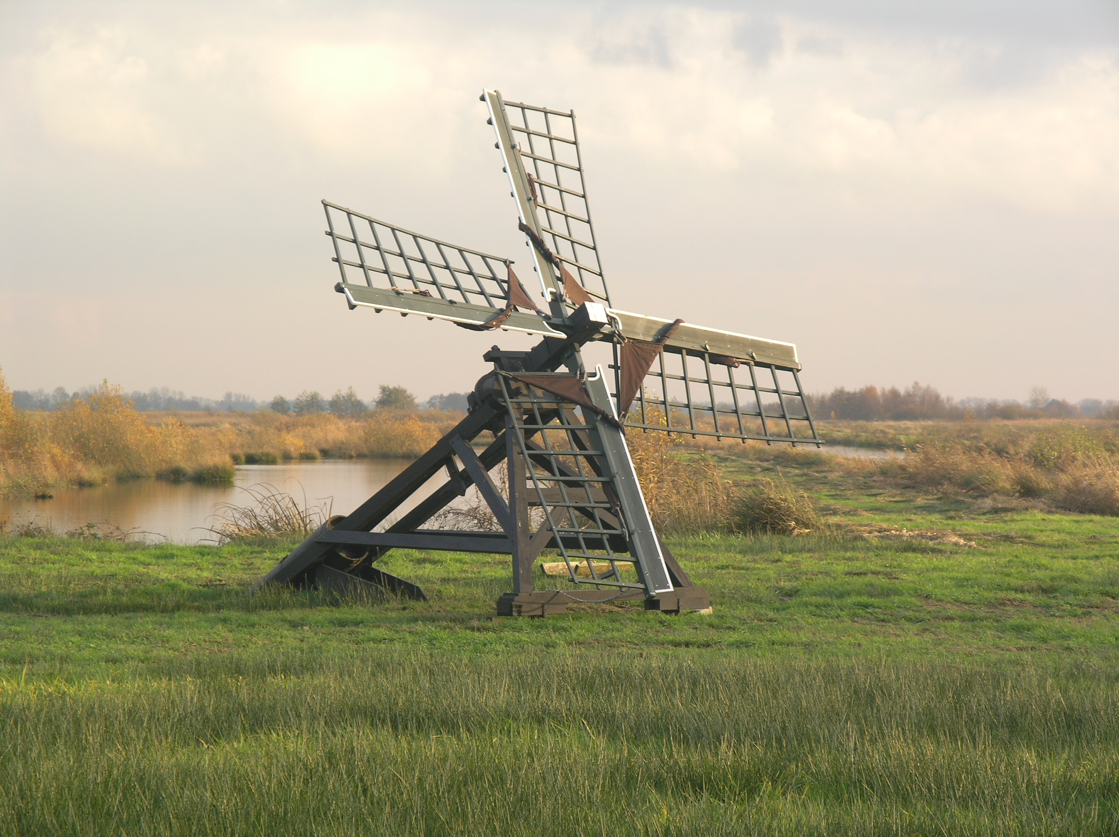 Nijetrijne Boktjasker